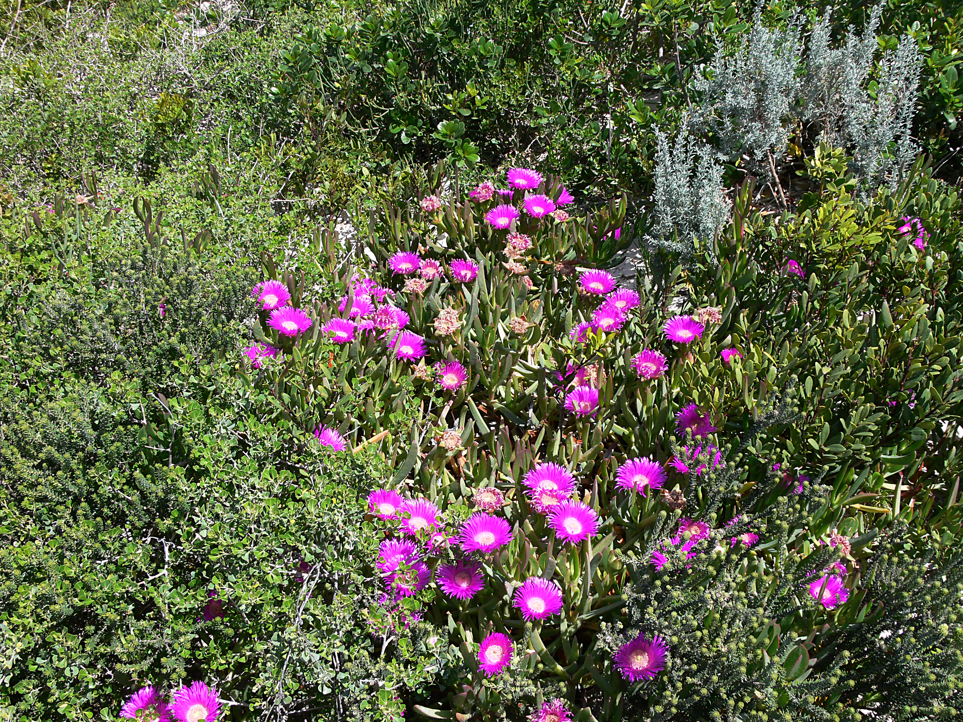 Rote Mittagsblume Carpobrotus acinaciformis (L.) L. Bolus, de Hoop National Park, Westkap, Südafrika